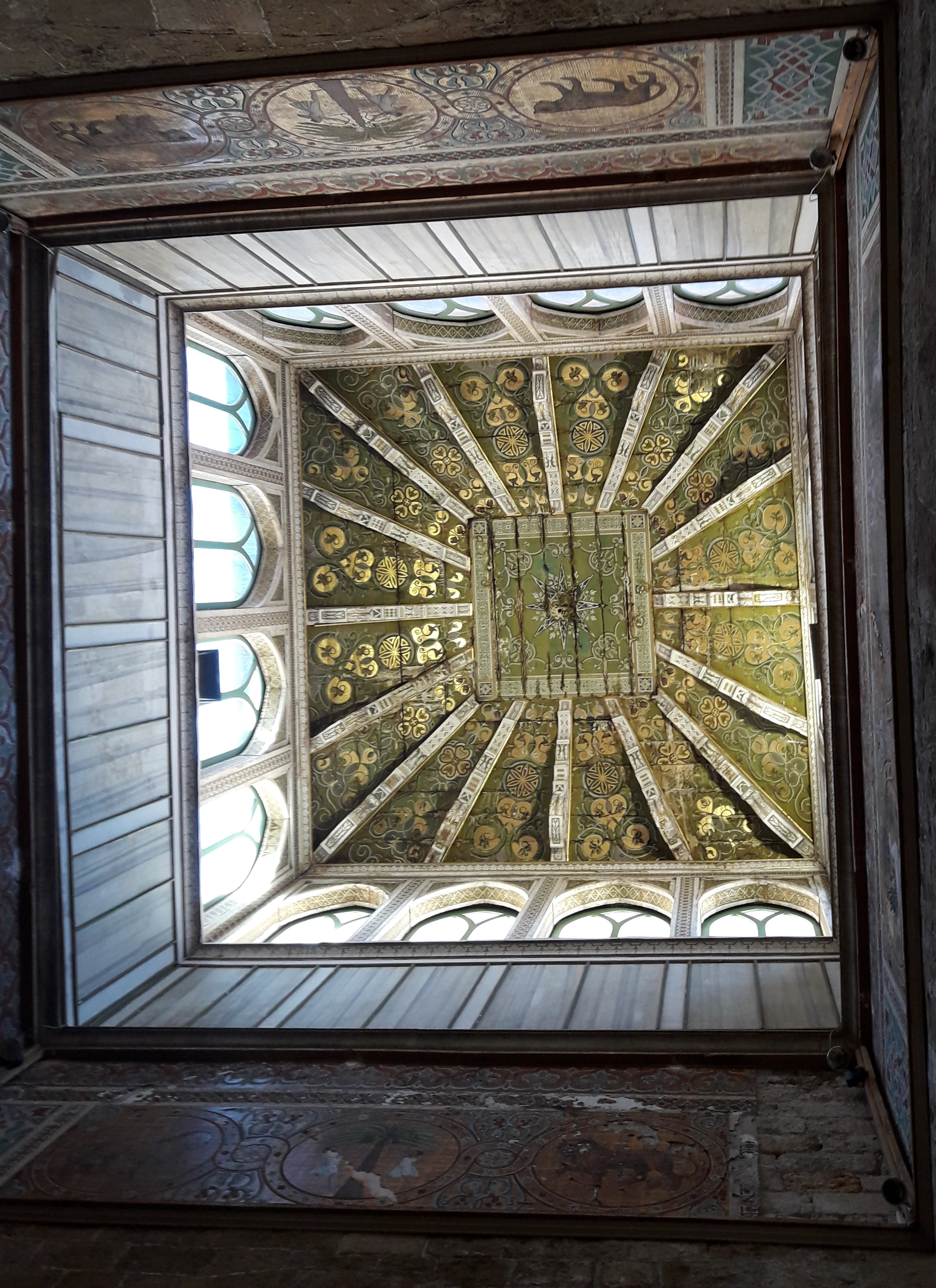 La volta della Sala dei Venti, Palazzo dei Normanni